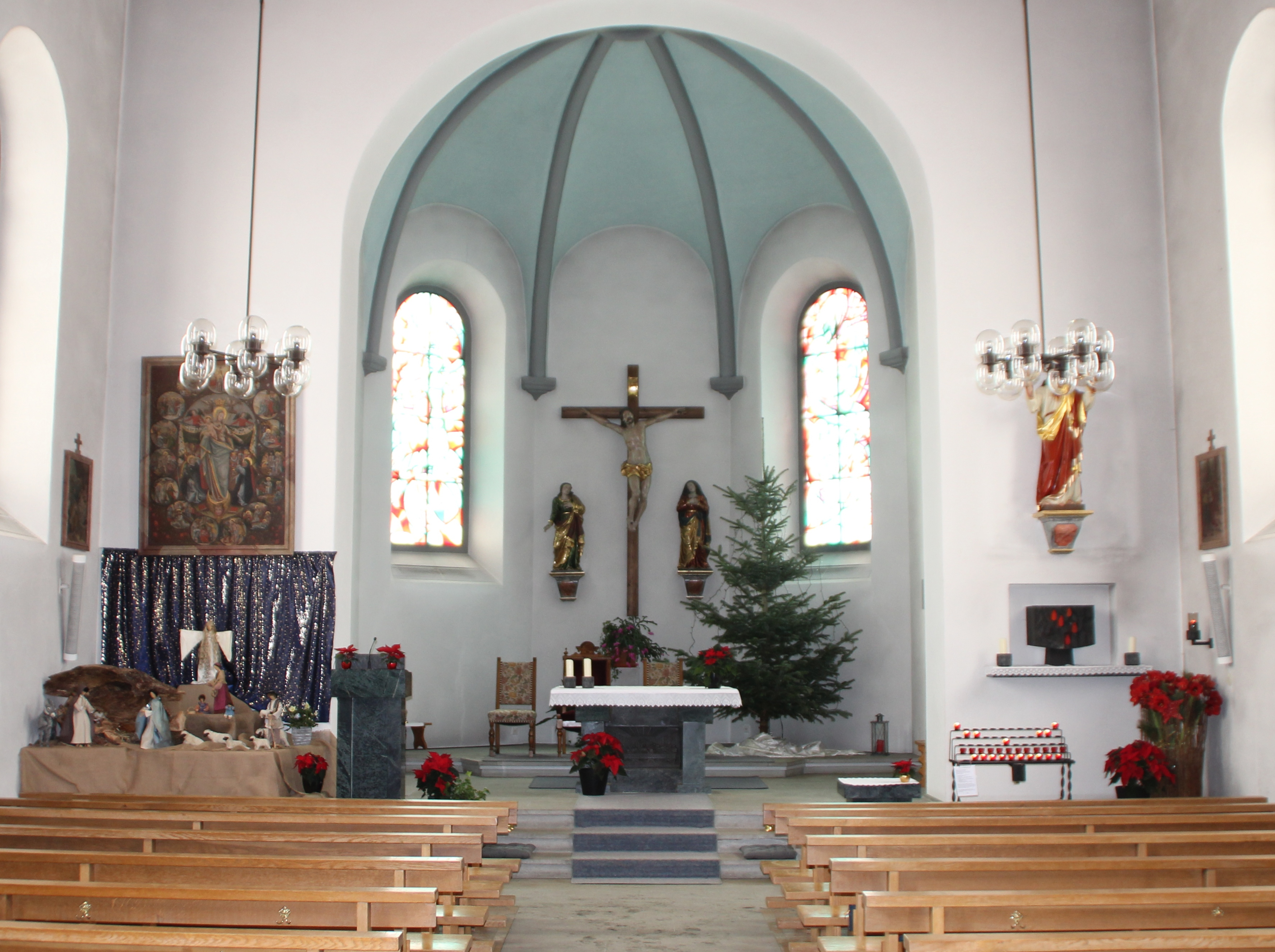 Herz-Jesu-Kirche (Falera) innen